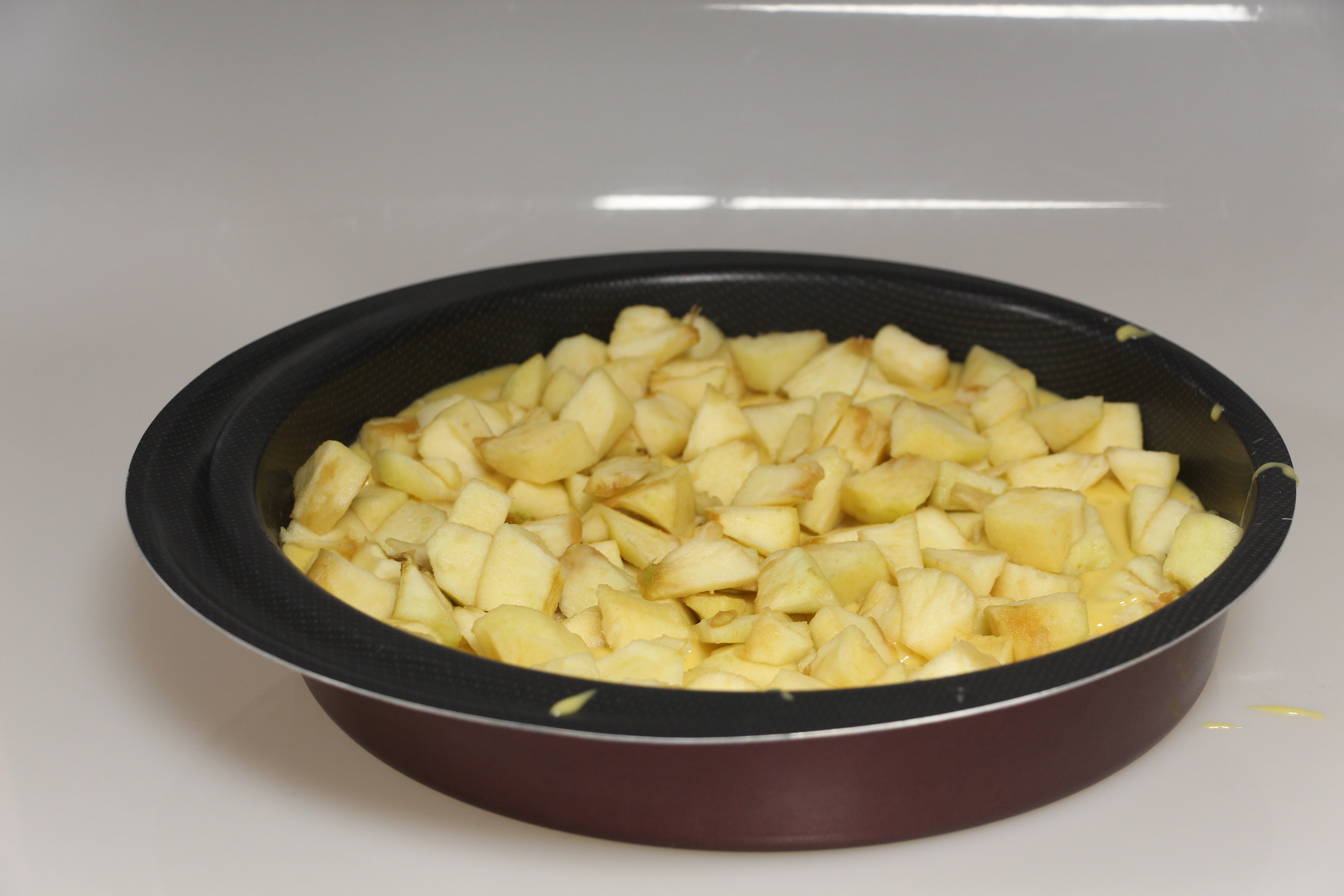 Flaugnarde préparation avant la cuisson dans le plat de cuisson